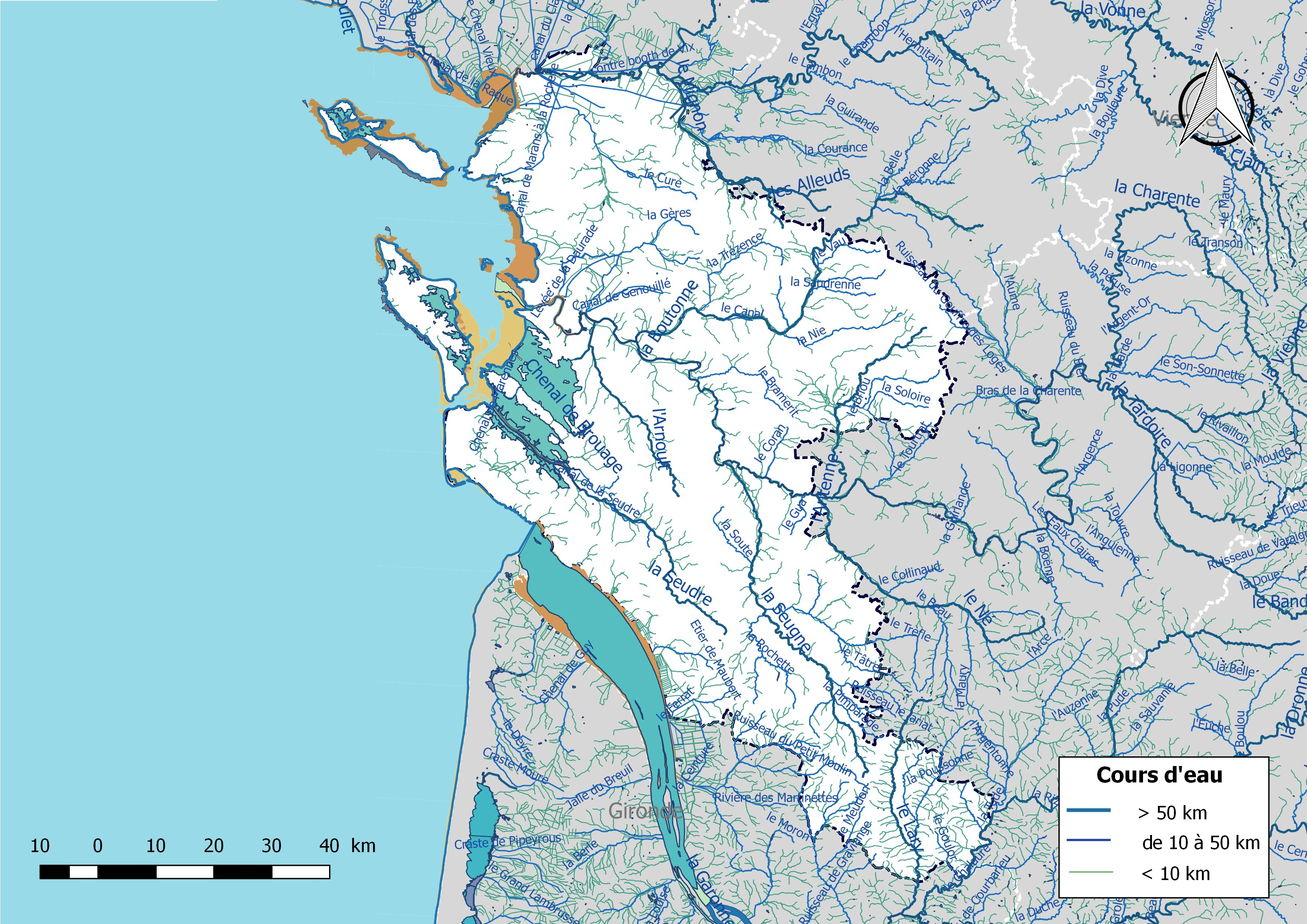 Réseau hydrographique du département de la Charente-Maritime (France).